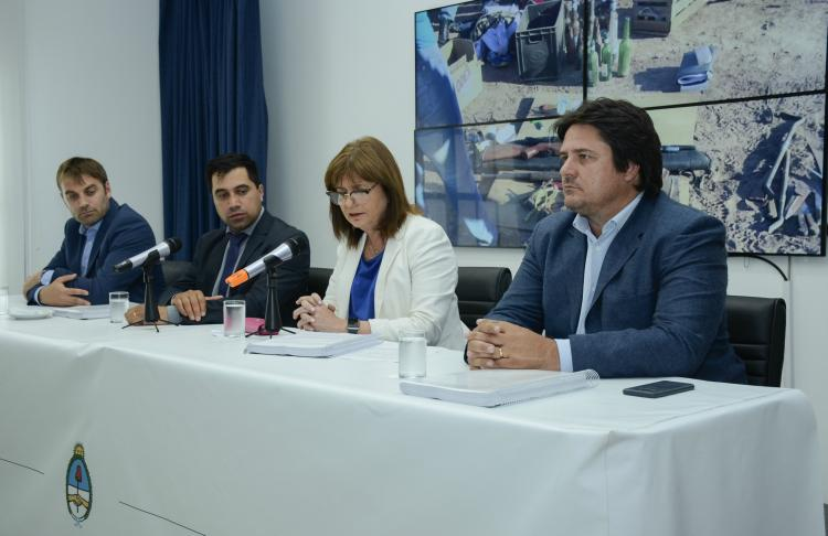 Comando Unificado contra la violencia de la RAM. Tras 8 años de una escalada de violencia creciente, la ministra de Seguridad de la Nación Patricia Bullrich junto con los ministros de Gobierno de Chubut, Pablo Durán, de Seguridad de Nequén, Jorge Lara, y el ministro de Seguridad de Río Negro Gastón Pérez Estevan, crearon un comando unificado para el abordaje de la problemática. Con 96 causas judiciales en su contra, este grupo violento ha intensifcado sus ataques, atemorizando a toda los ciudadanos.